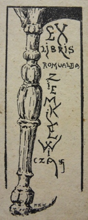 Экслібрыс Р. Зямкевіча